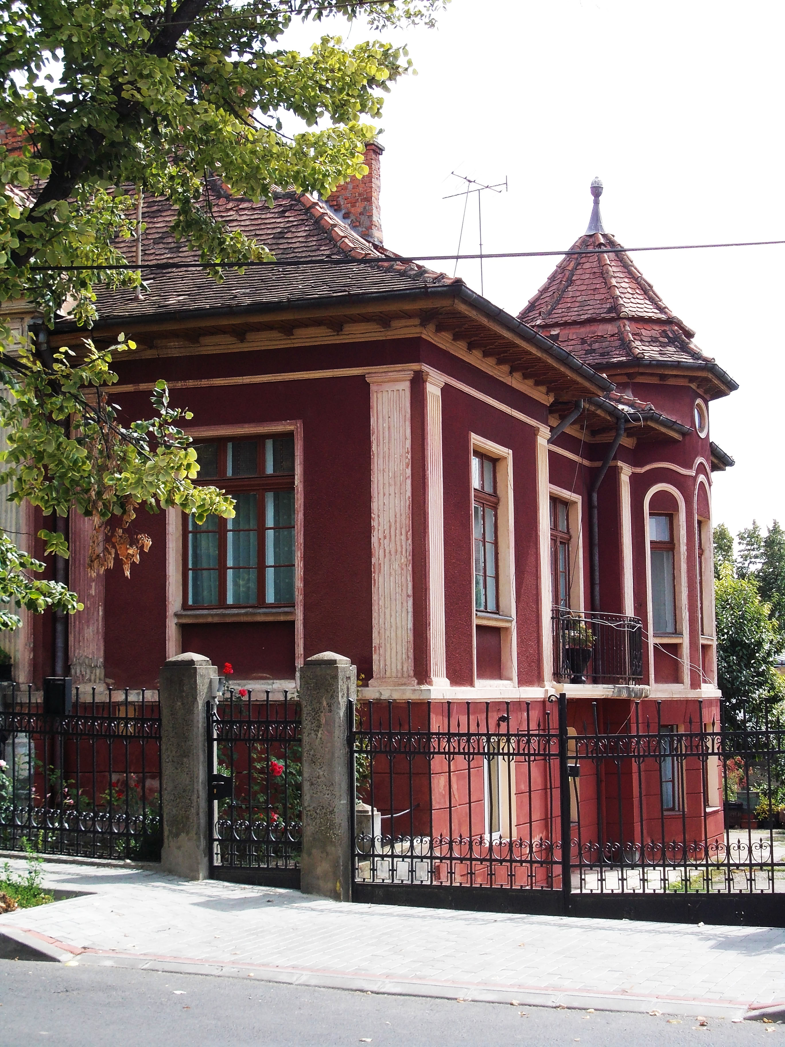 Casa nr. 5